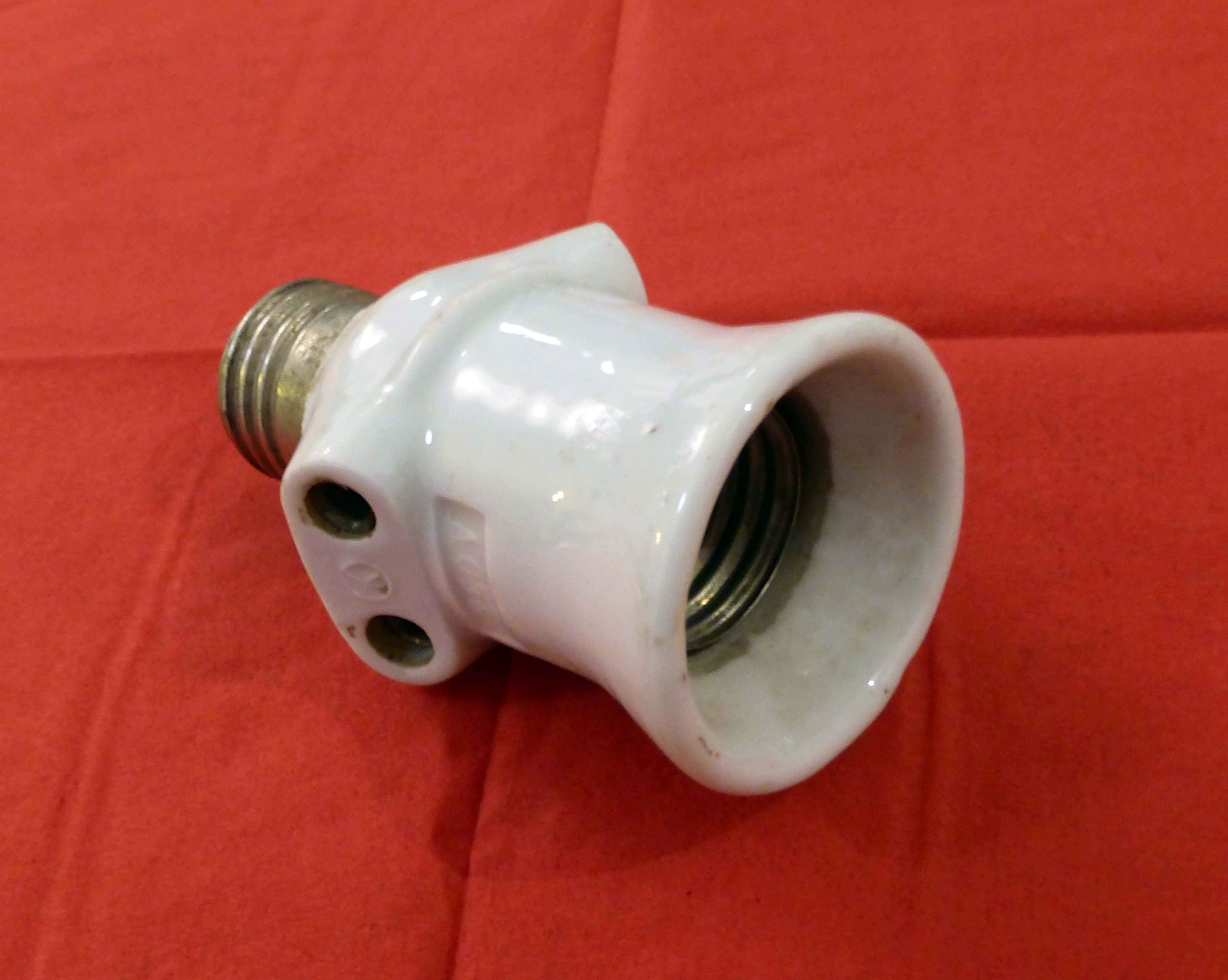 Zwischenfassung (E27) für eine Glühlampe zum zusätzlichen Anschluss zweier Netzstecker. (Ohne VDE-Zulassung!)